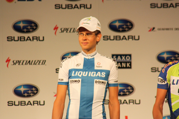 Le coureur cycliste Kjell Carlström en 2009 lors de la Japan Cup.